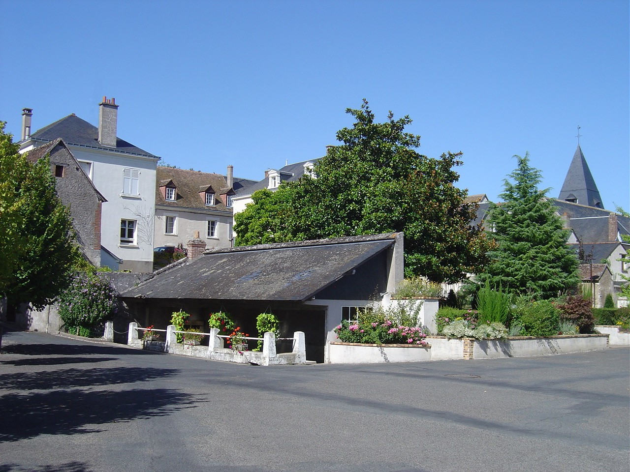 Vue de Limeray Indre et Loire France